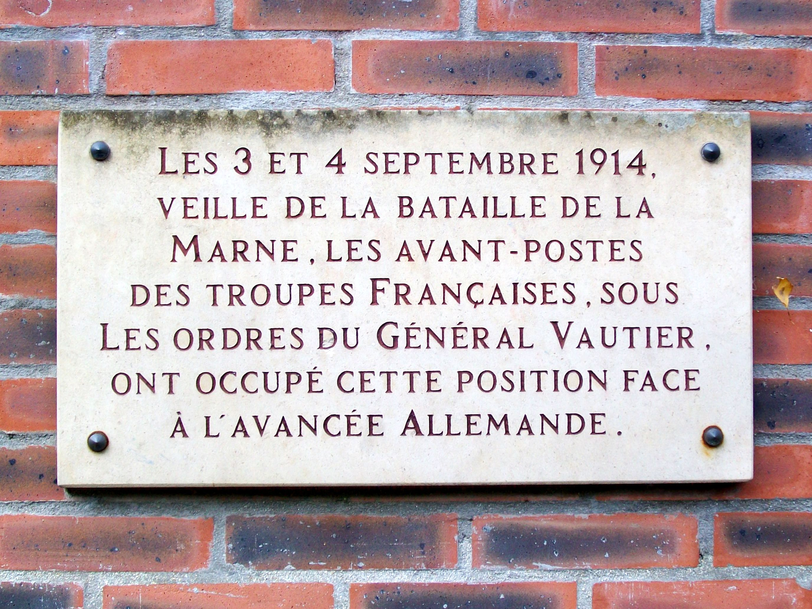 Plaque commémorative 1ère guerre mondiale, 3 et 4 sept. 1914 à Survilliers (95).